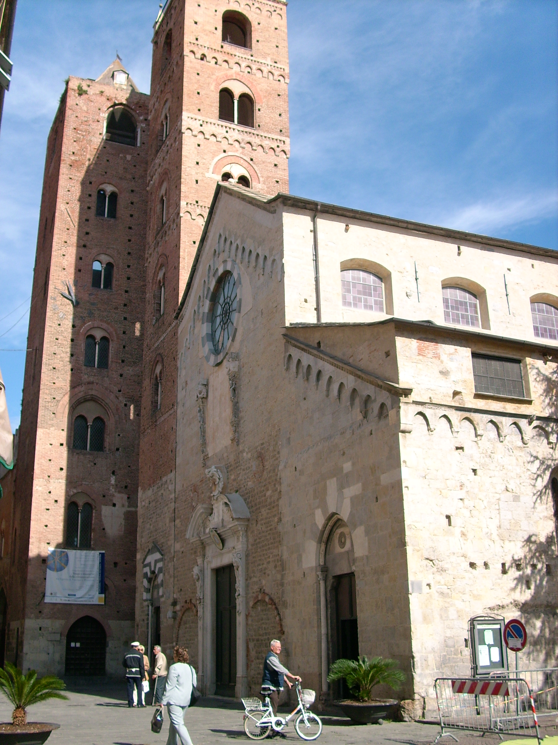 Cattedrale di San Michele Arcangelo di Albenga, Liguria, Italia